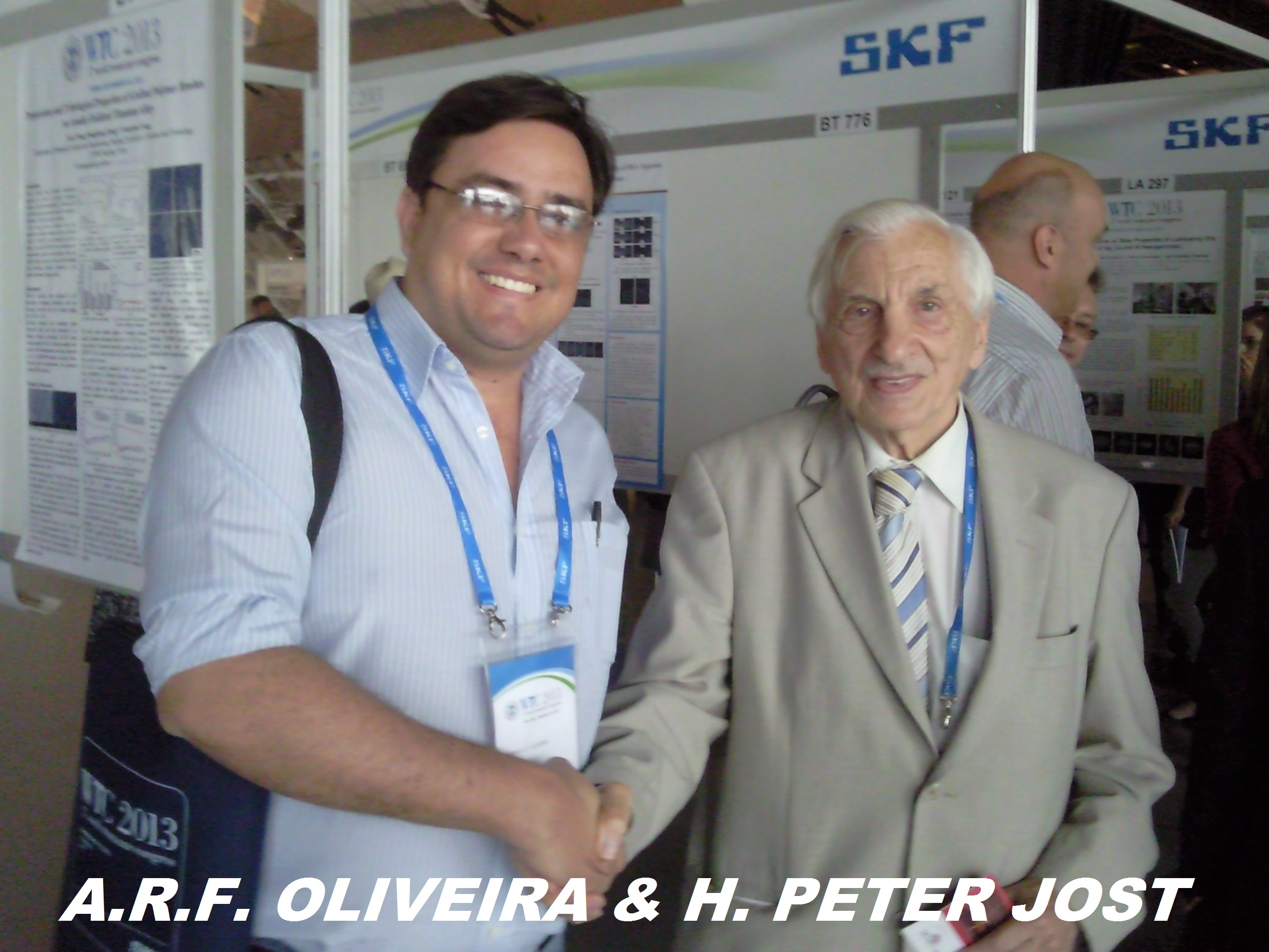 H. Peter Jost , CBE (25 de janeiro 1921 - 7 junho 2016 ) foi um engenheiro mecânico britânico. Ele é o fundador da disciplina de tribologia.